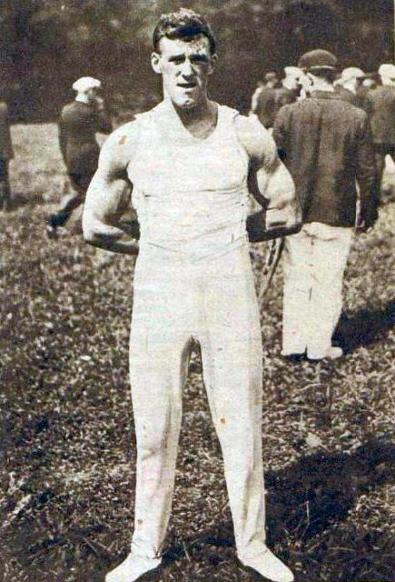 Georges Leroux, en juillet 1931.